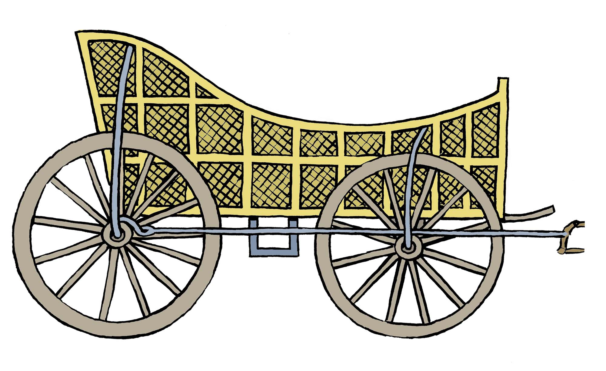 Coche